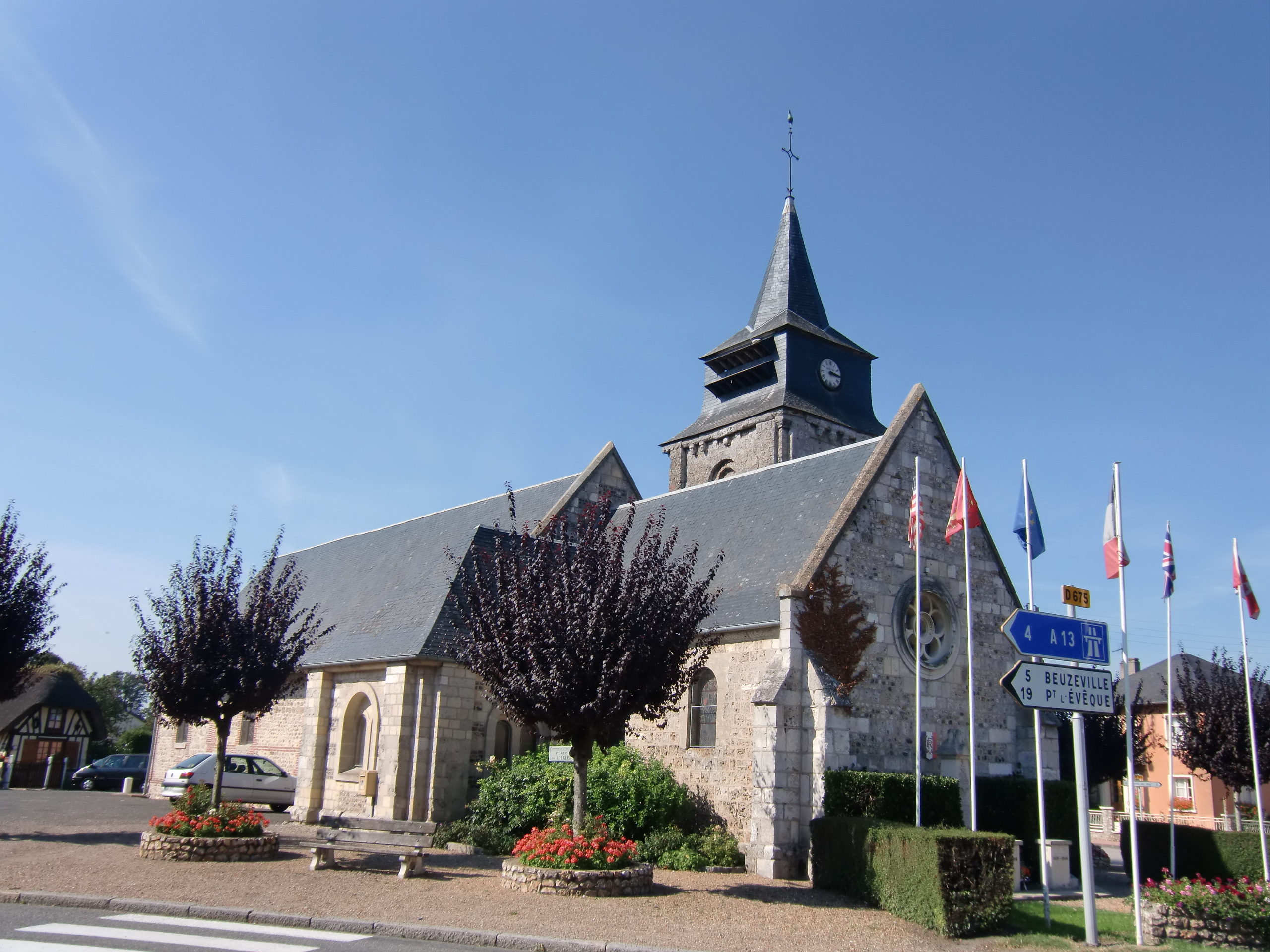 église de Saint-Maclou (Eure, Normandie, France)